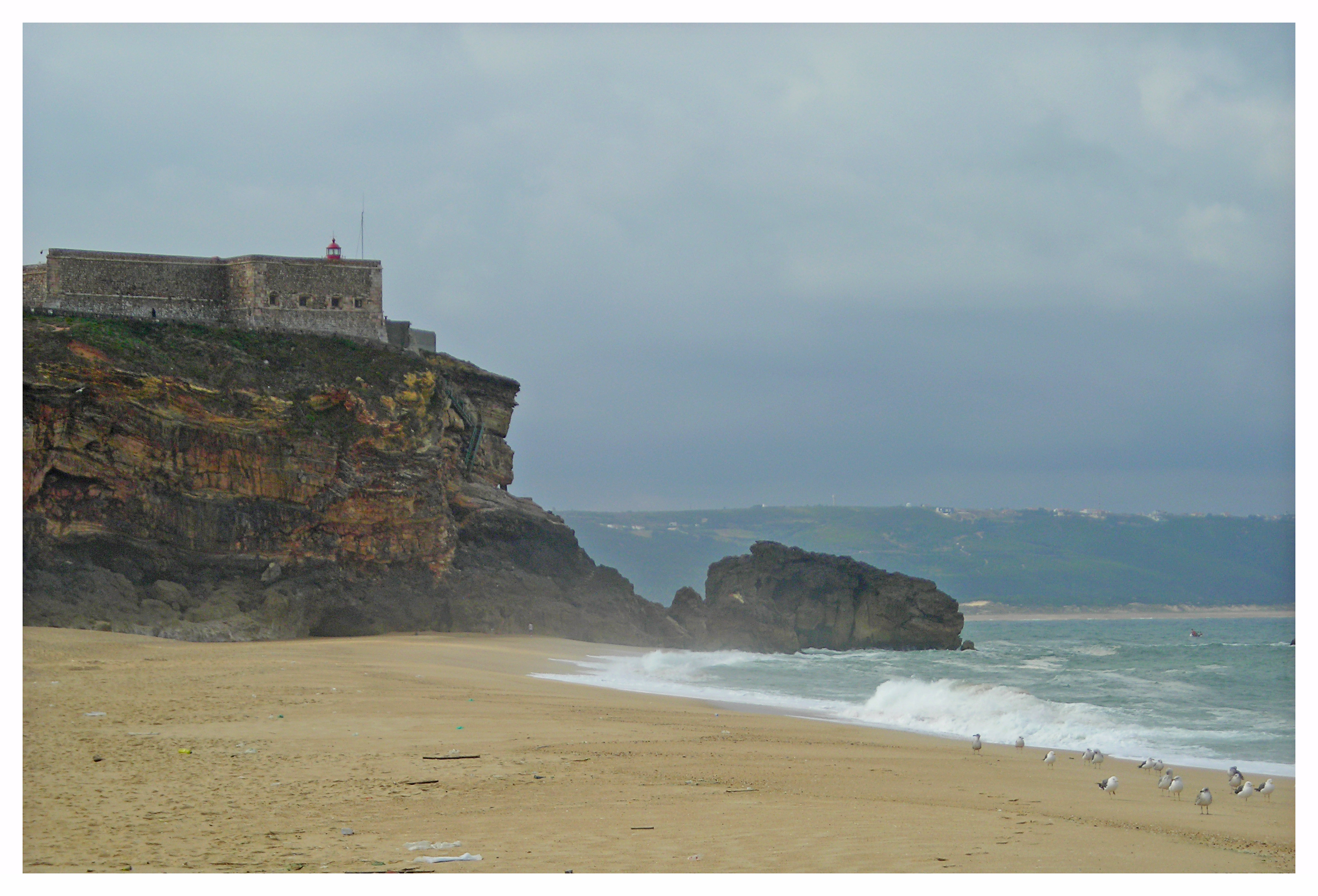 pt: Forte de São Miguel Arcanjo, Nazaré